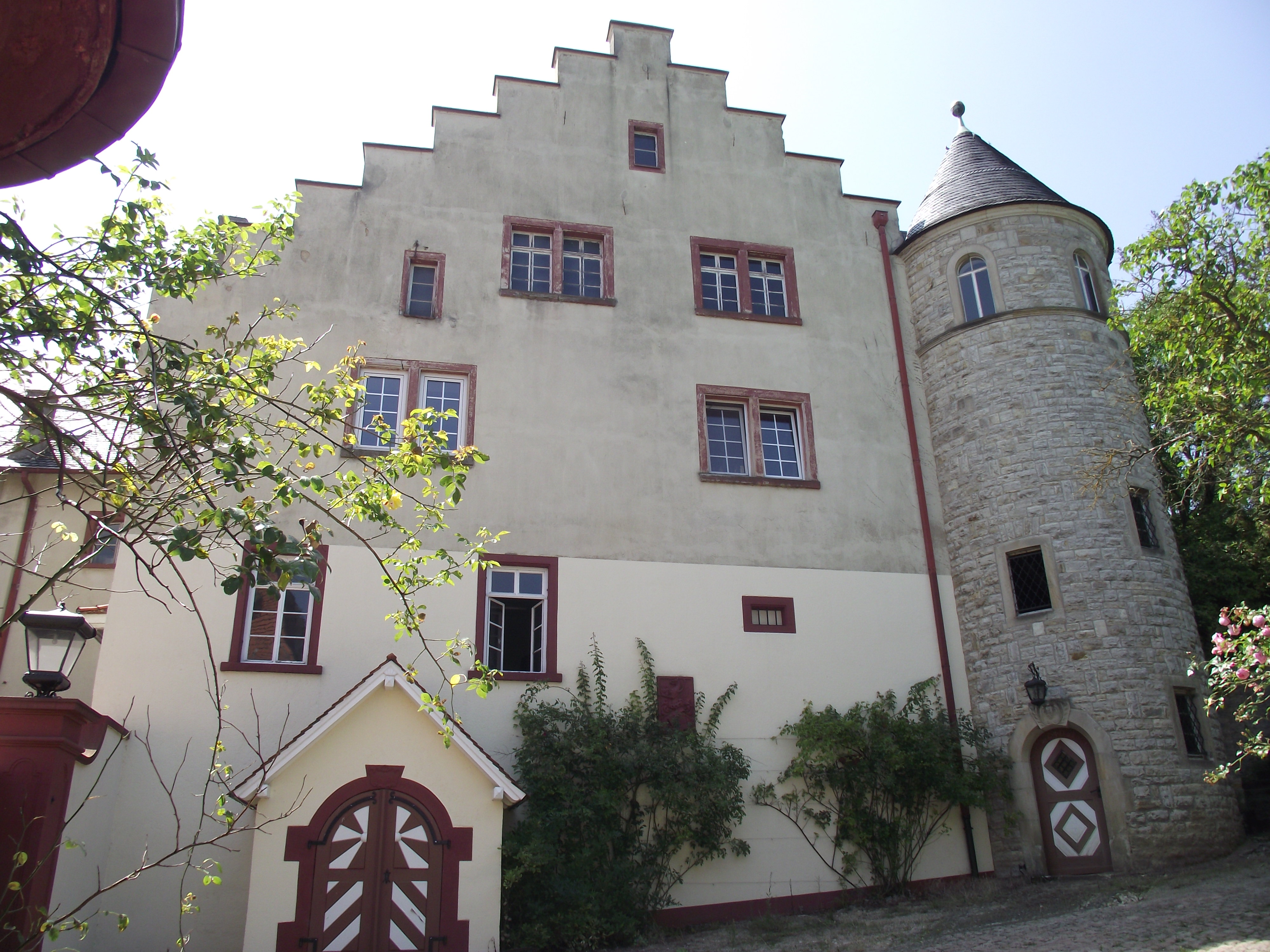 Nördlicher Gebäudeteil im August 2011